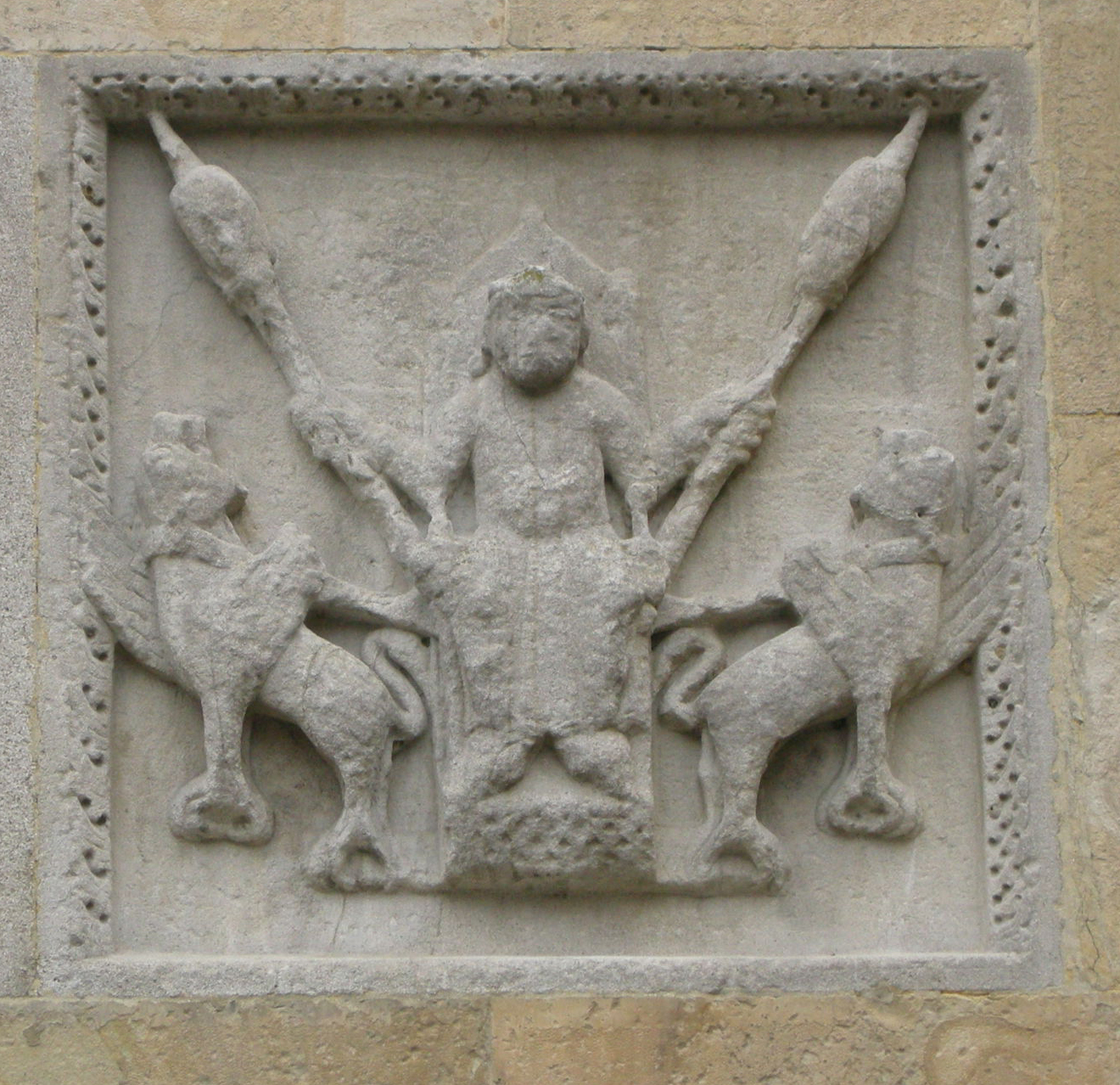 Duomo di fidenza, sculture sulla torre dx, volo di alessandro magno